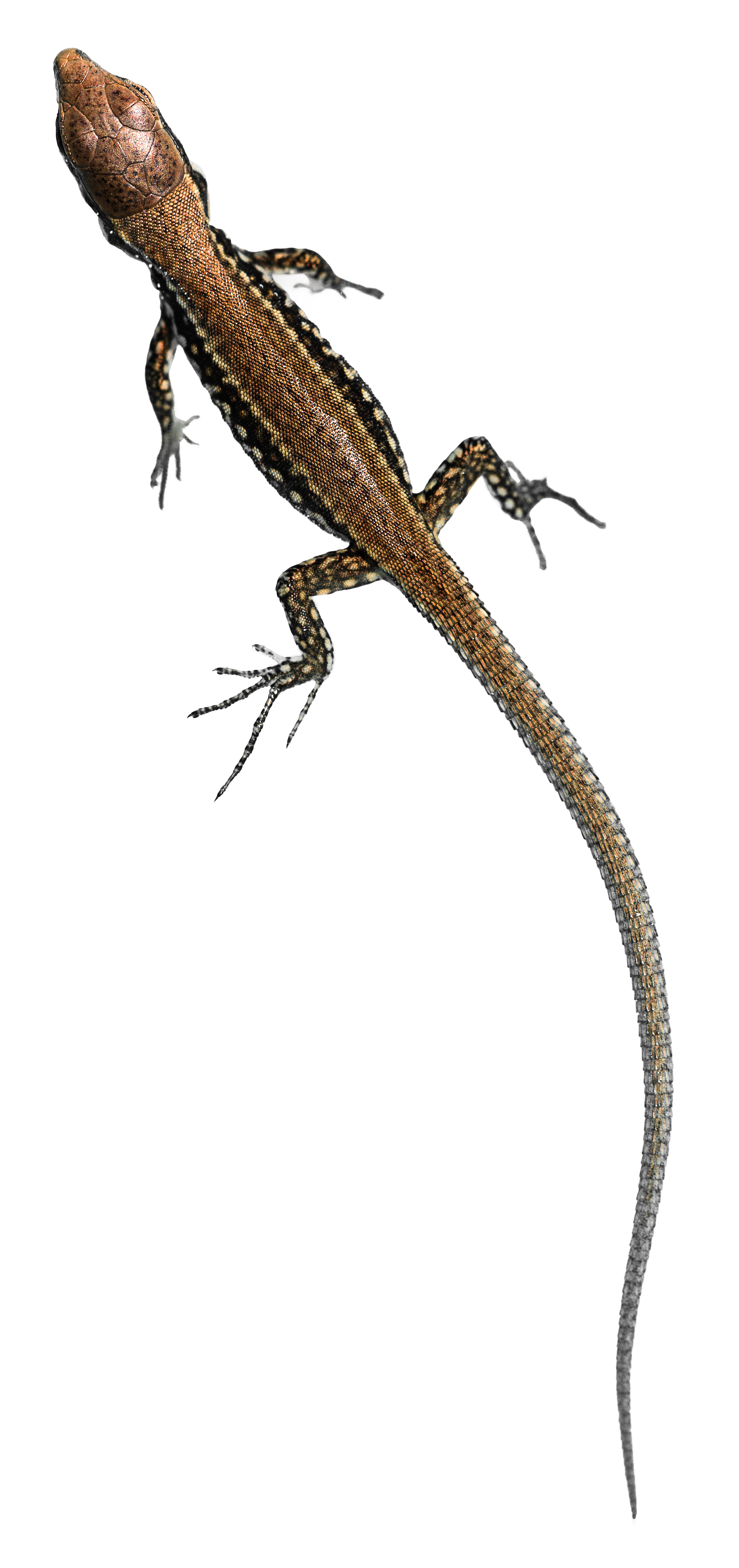 Junge Mauereidechse (Podarcis muralis) im Wasser schwimmend.